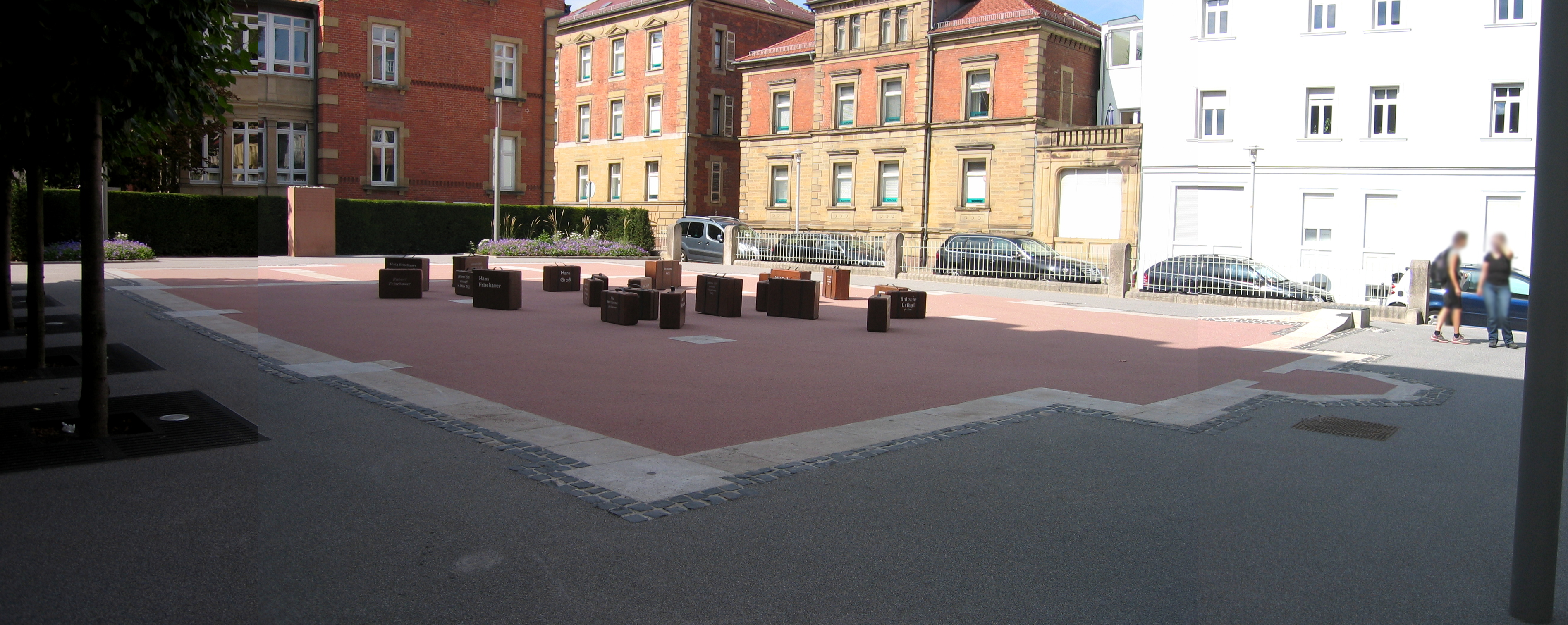 Ehemalige Synagoge Ludwigsburg (2015 Panorama)